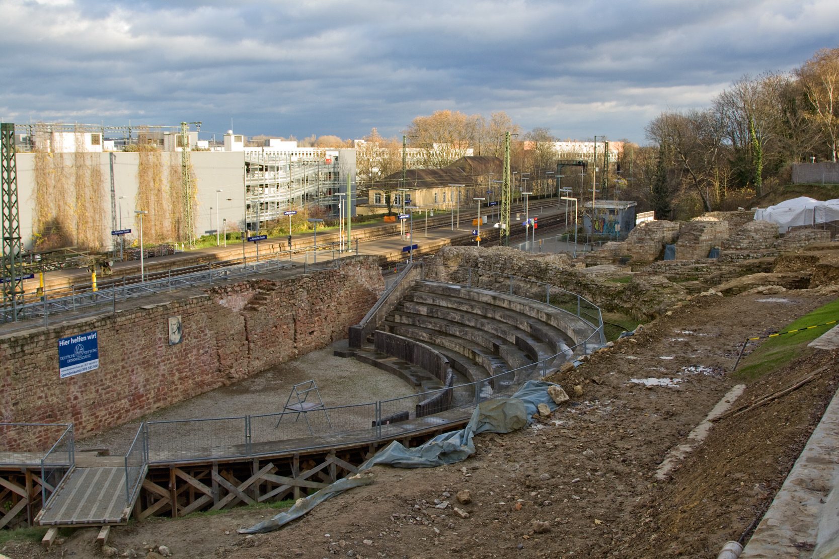 Römisches Bühnentheater von Mogontiacum (heute Mainz) aus dem 2. Jahrhundert.